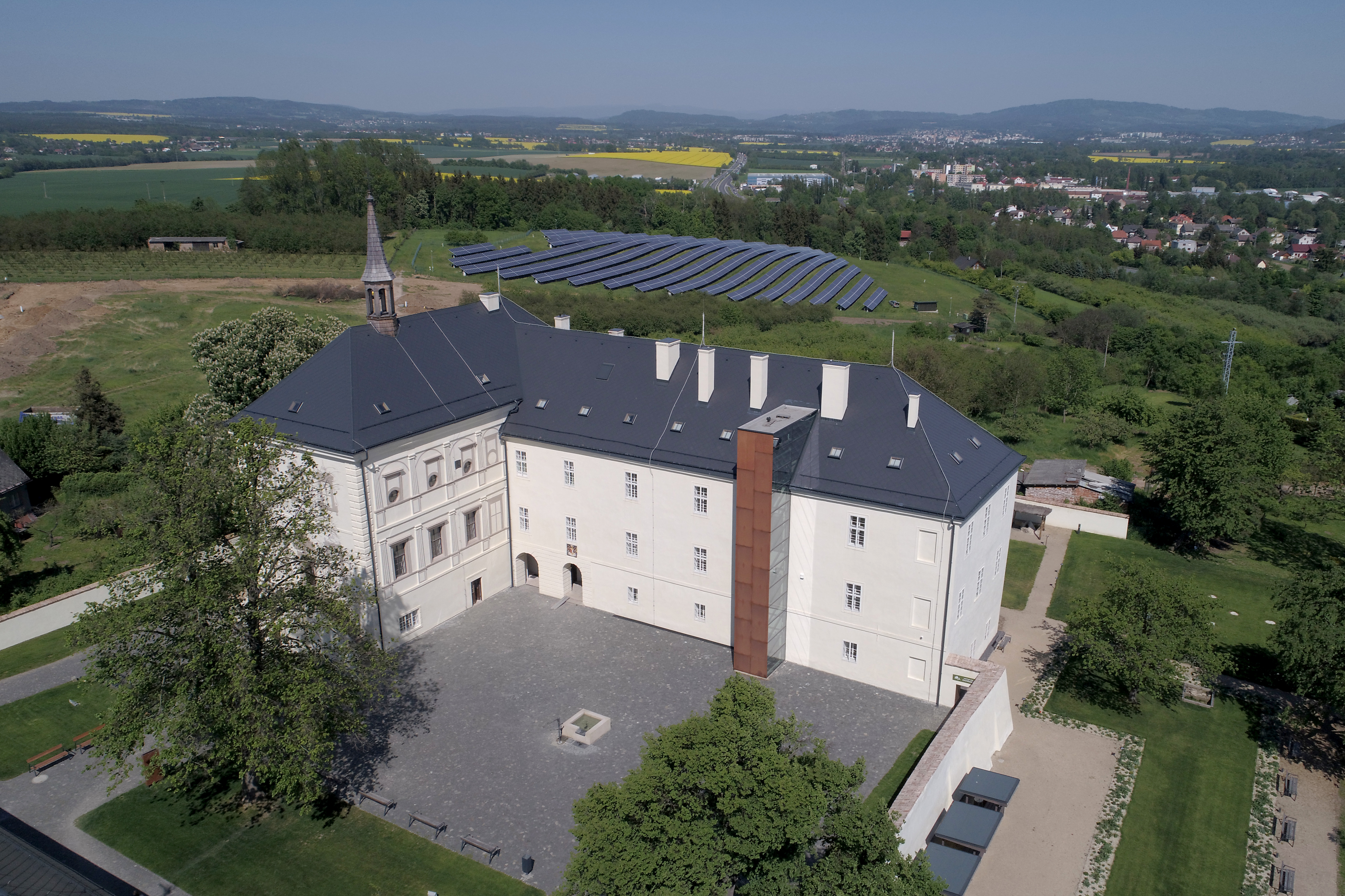 Zámek Svijany, letecký pohled, Svijany